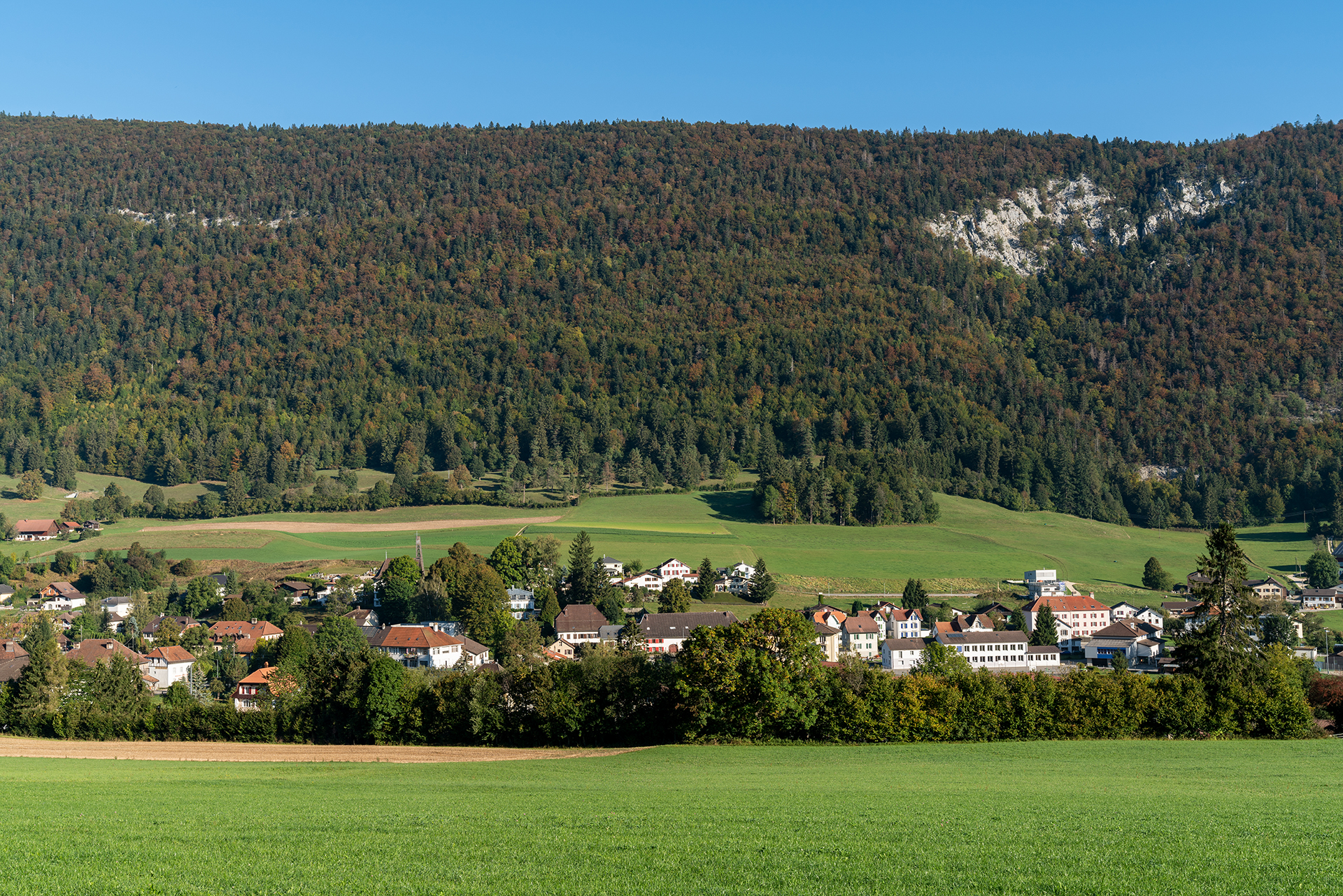 Cortébert (BE)